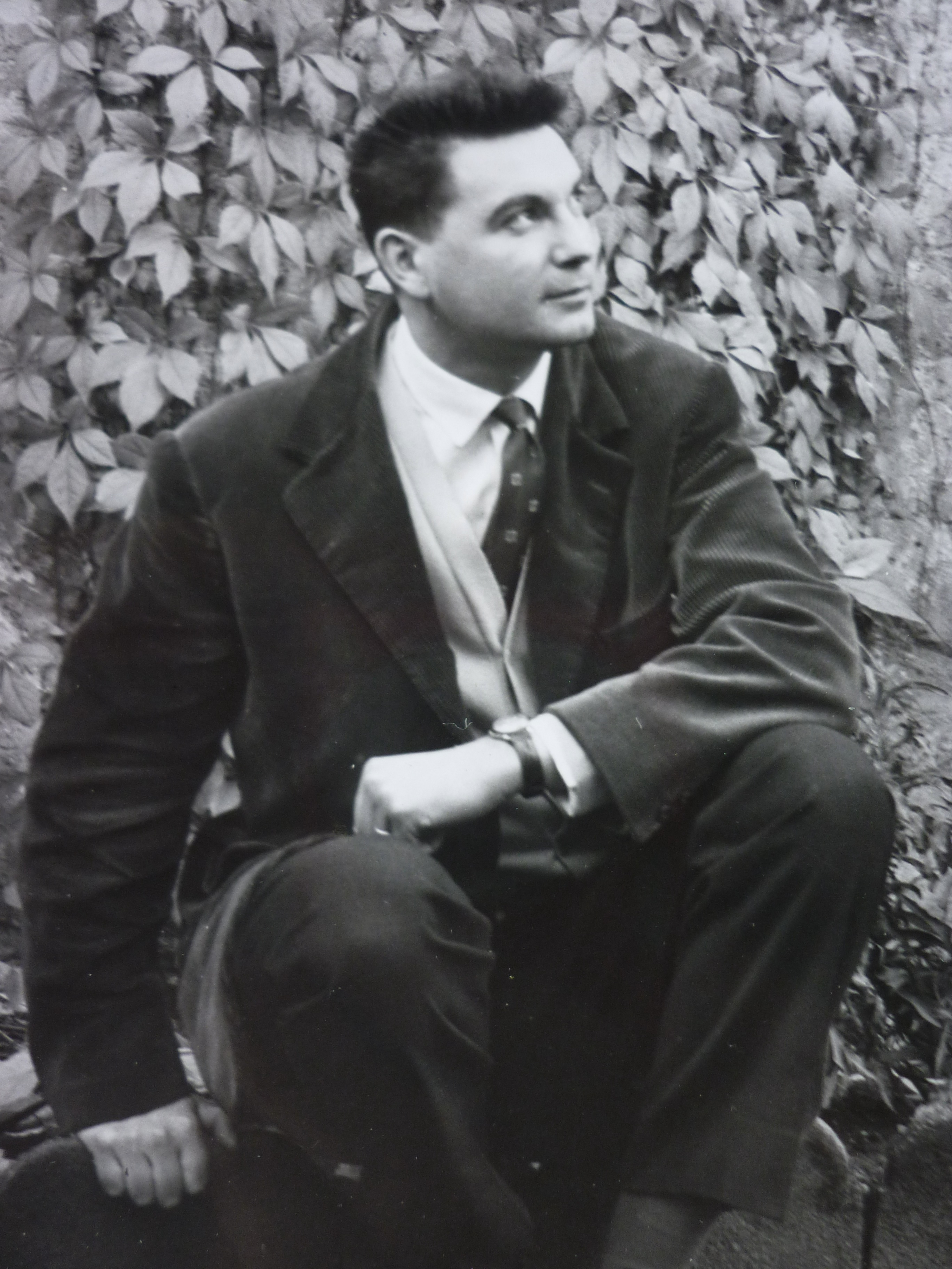 Photo de Forton